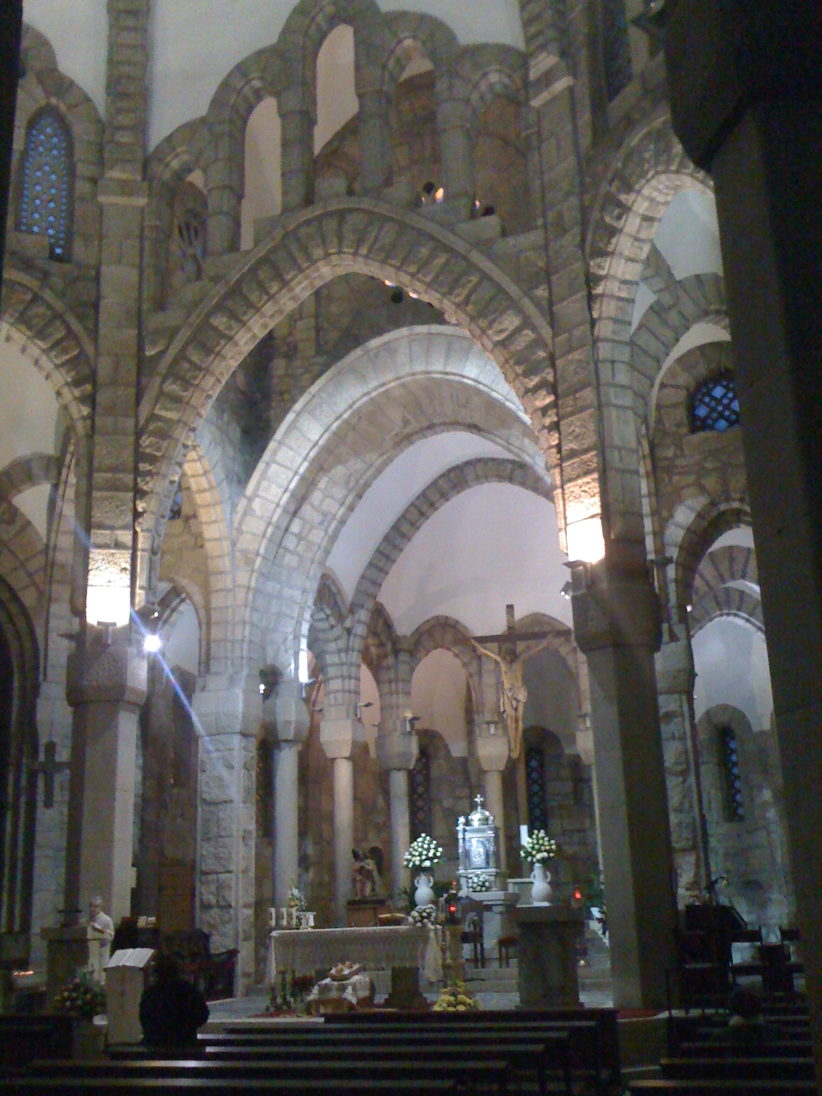 Interior del Templo